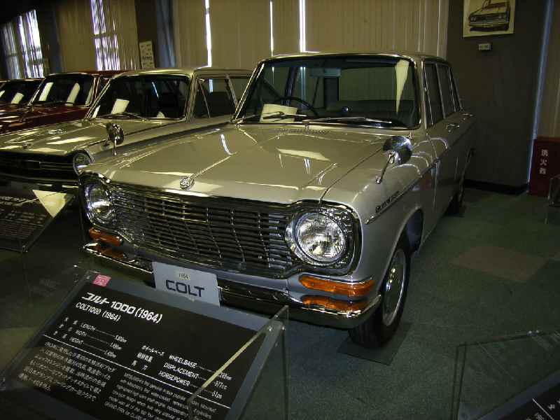 Mitsubishi Colt 1000 1960-65